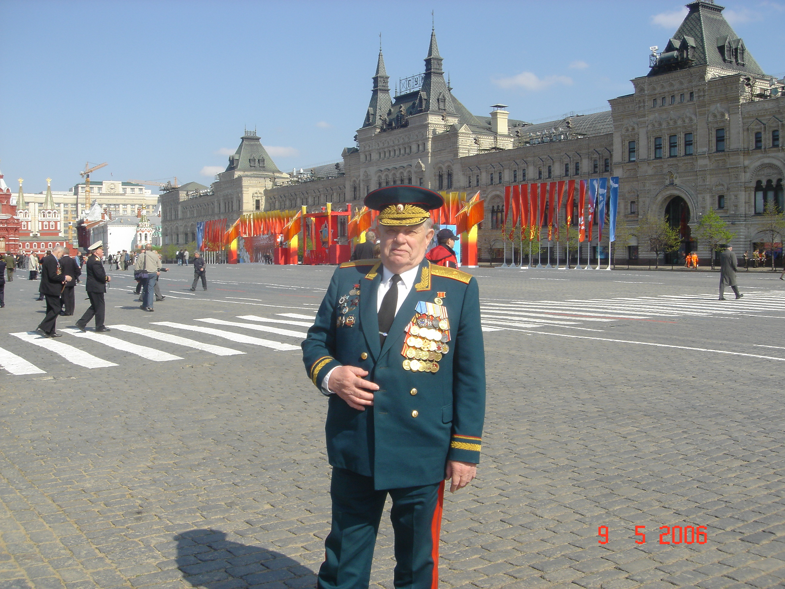 Парад Победы